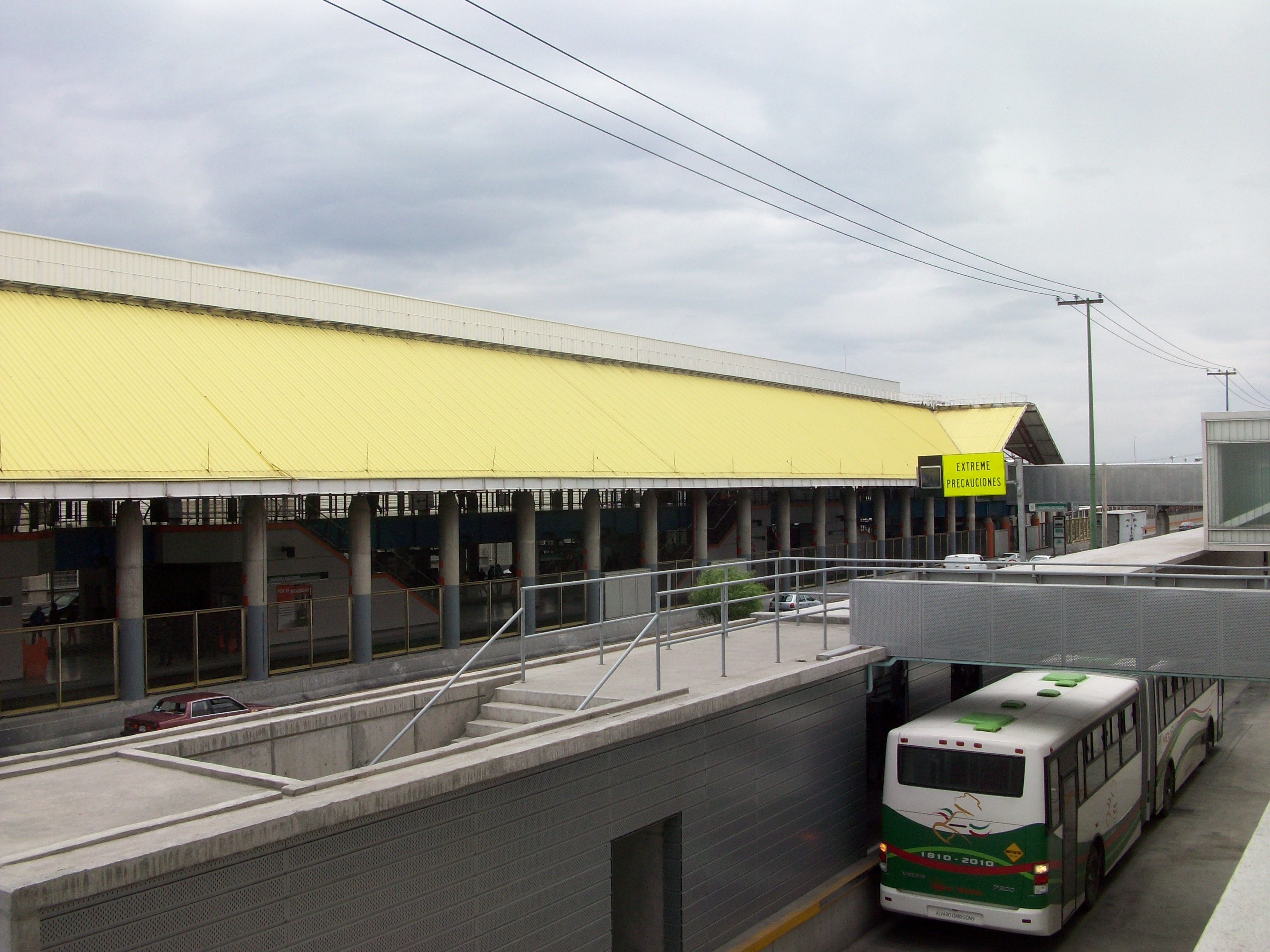 Edificio de la estacion Ciudad Azteca con un mexibus